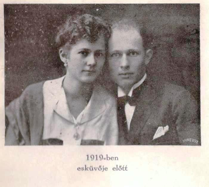 Sipos Domokos és felesége Komáromy Grancianna